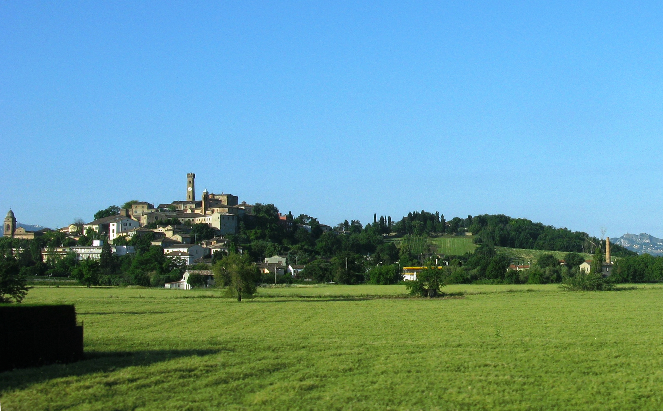 Panorama di Santarcangelo di Romagna.